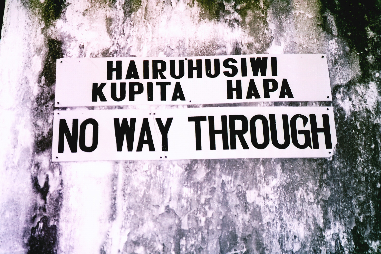 Zanzibar sign